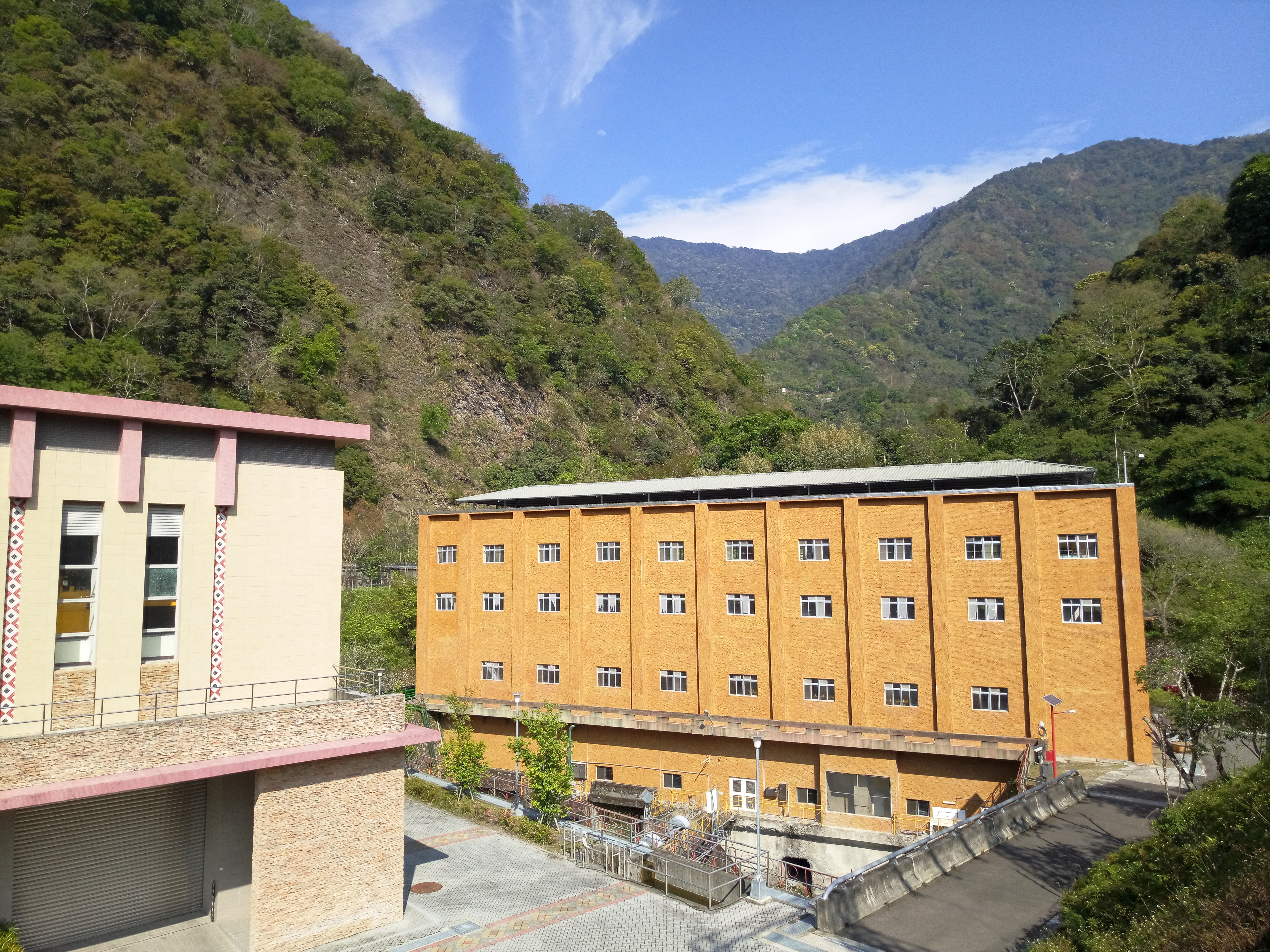 萬大發電廠廠房外觀，前方為1號至3號機廠房，左邊為新建之4號機廠房